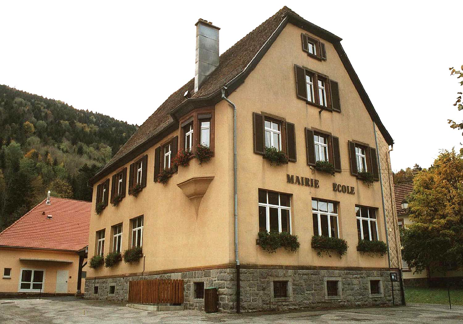 Mairie de Mittlach Photo : Samuel Wernain (25 octobre 2006).